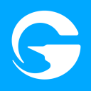 Versión del logo de Gameforge de 2017